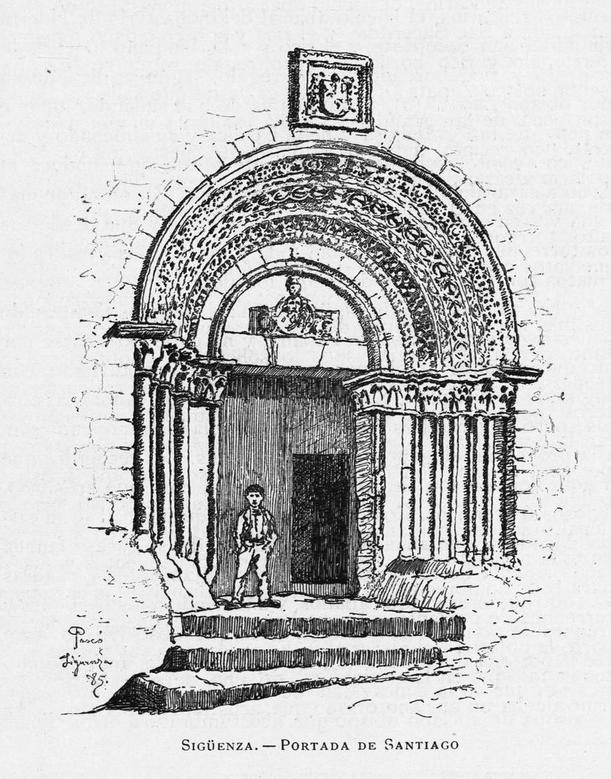 Portada de Santiago, en Sigüenza.